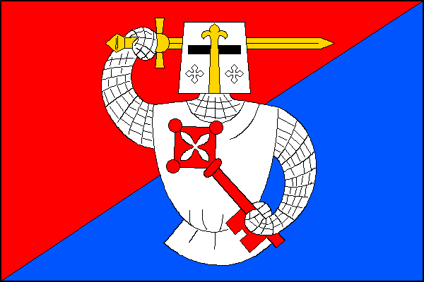 Vlajka obce Nezdenice